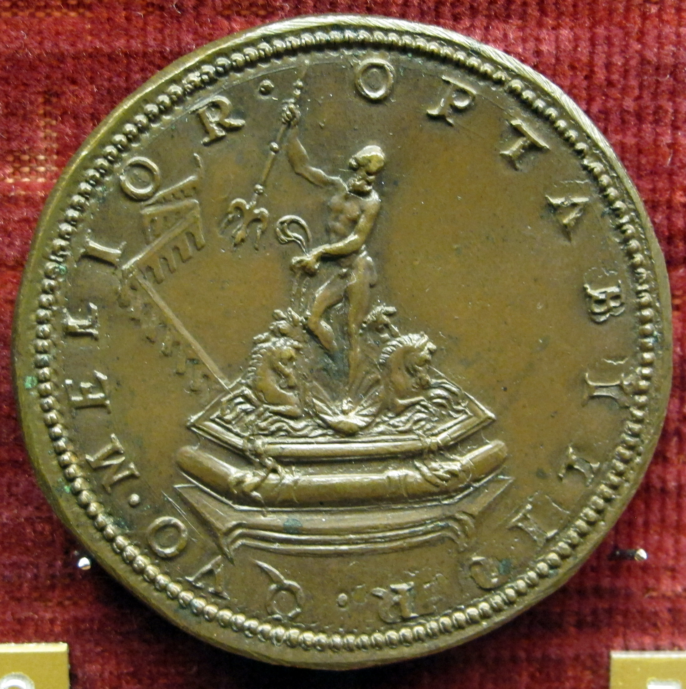 Pier paolo galeotti, medaglia di cosimo I de' medici e optabilior quo melior, verso con fontana nettuno e acquedotto boboli